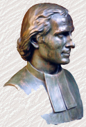 Buste Marcellin (de Catalogne)